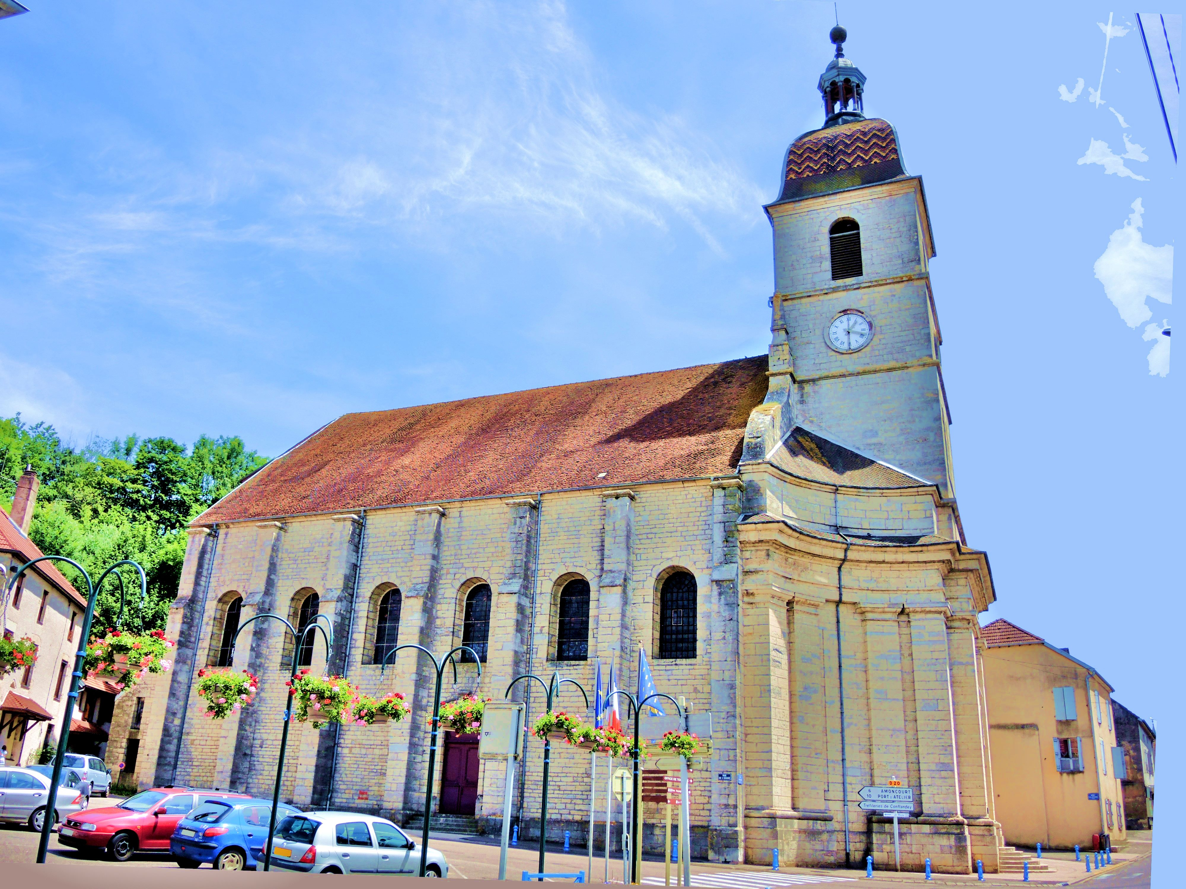 Eglise saint Etienne.